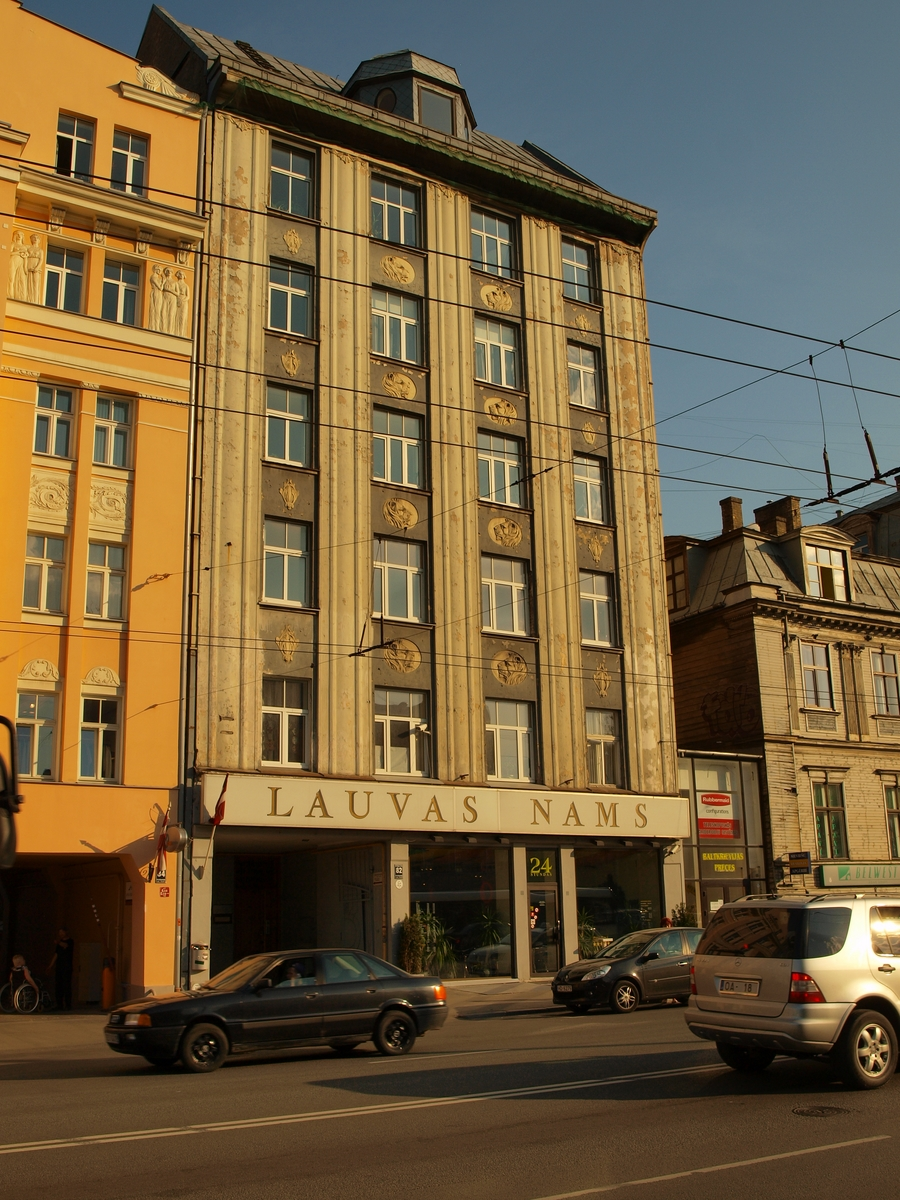 Lenina iela